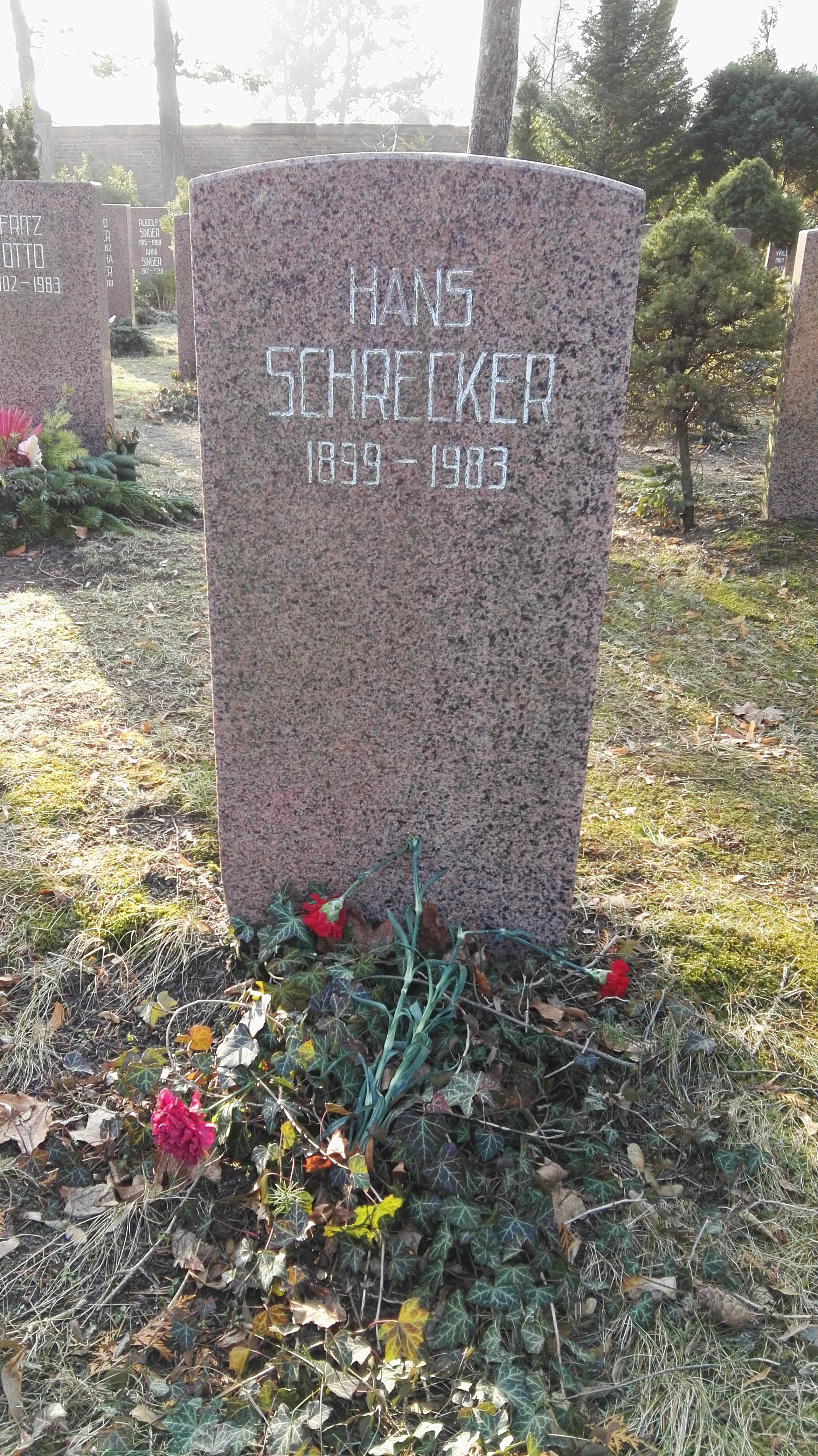 Grab von Hans Schrecker in der Grabanlage Pergolenweg auf dem Sozialistenfriedhof des Zentralfriedhofs Friedrichsfelde